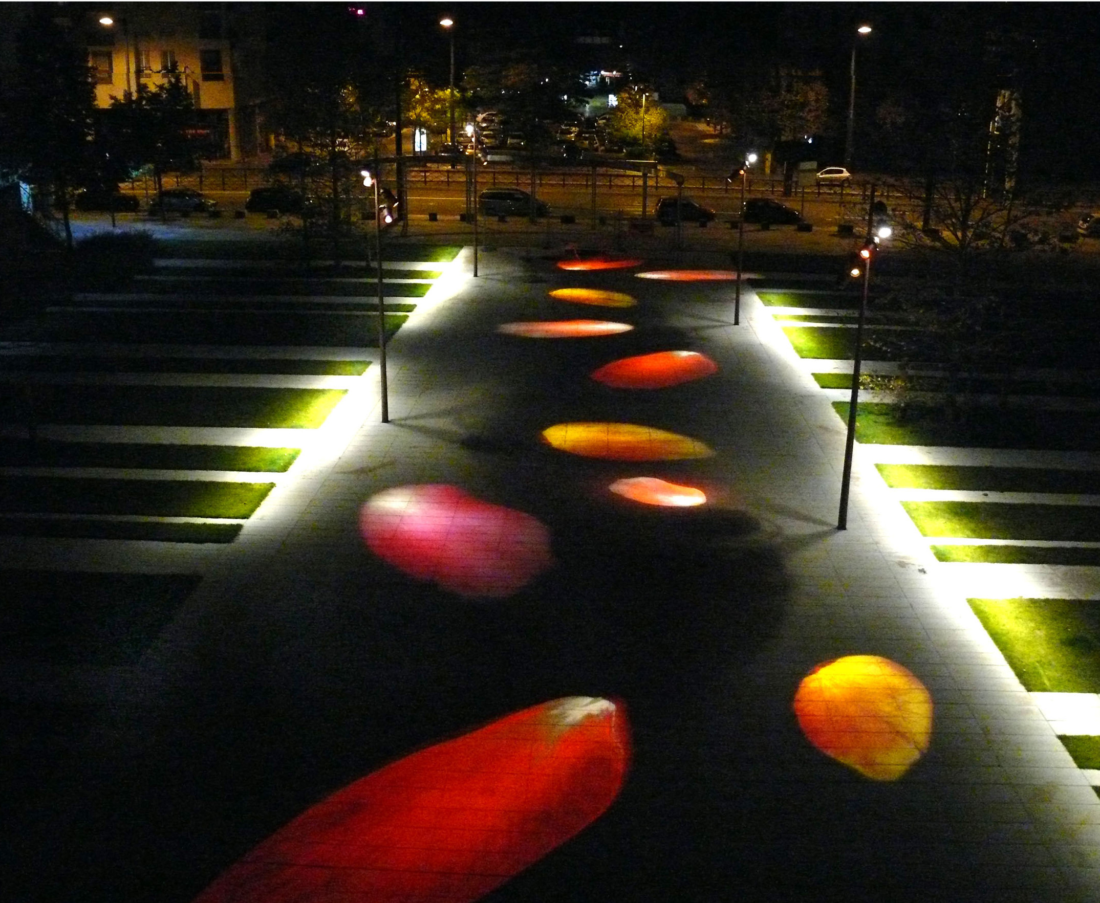 "Les pétales" éclairage de l'allée menant à la place de la République depuis l'avenue du Centre